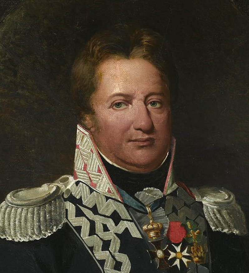 General Jan Henryk Dąbrowski